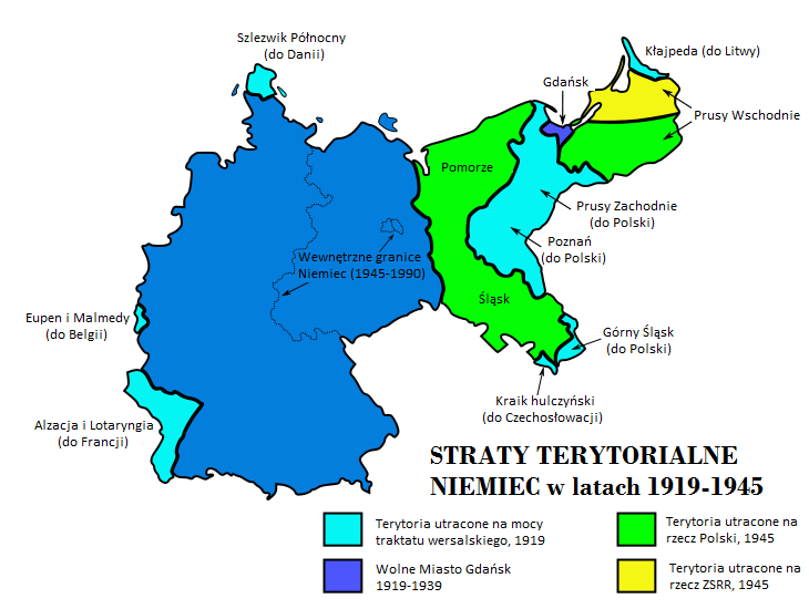 Utraty terytorialne Niemiec po I i II wojnie światowej